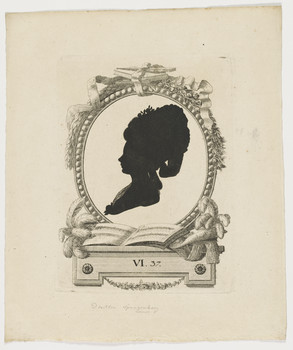 Schattenriss der Dorothea Charlotte Elisabeth Wehrs(1755-1808, Dichterin; heiratete seit 13. Januar 1781 mit dem Juristen Georg August Spangenberg). Bestand der Universitätsbibliothek Leipzig, Porträtstichsammlung, Inventar-Nr. 49/54